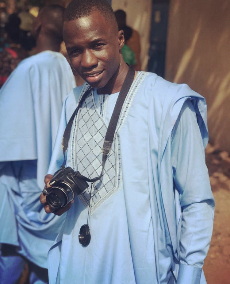 Concours wiki loves africa2020 This is an image with the theme "Africa on the Move or Transport" from: Mali